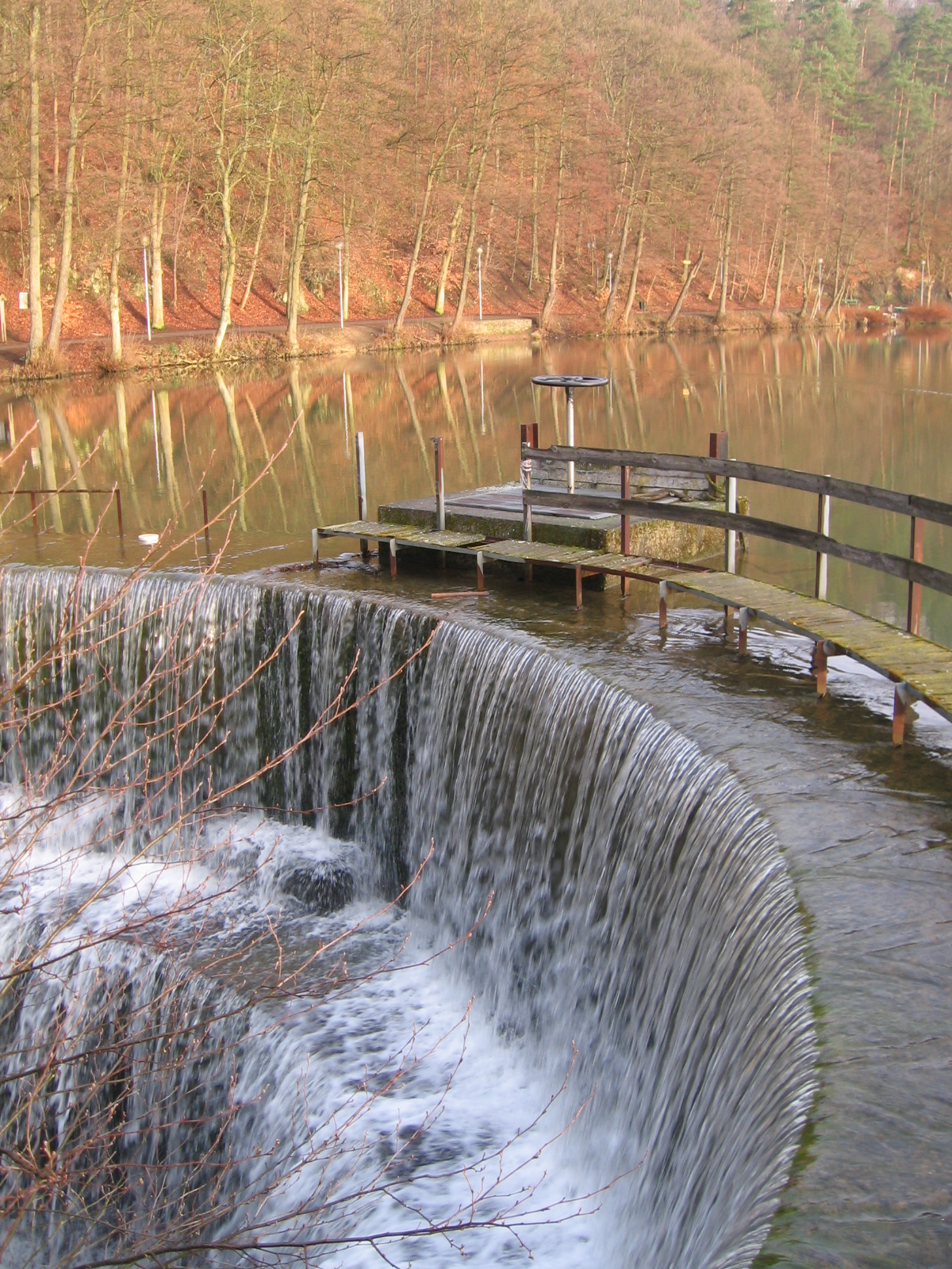 Lac de Warfaaz, belgische Ardennen